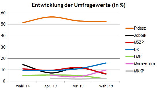 Europawahl 2019 Ungarn Umfragen